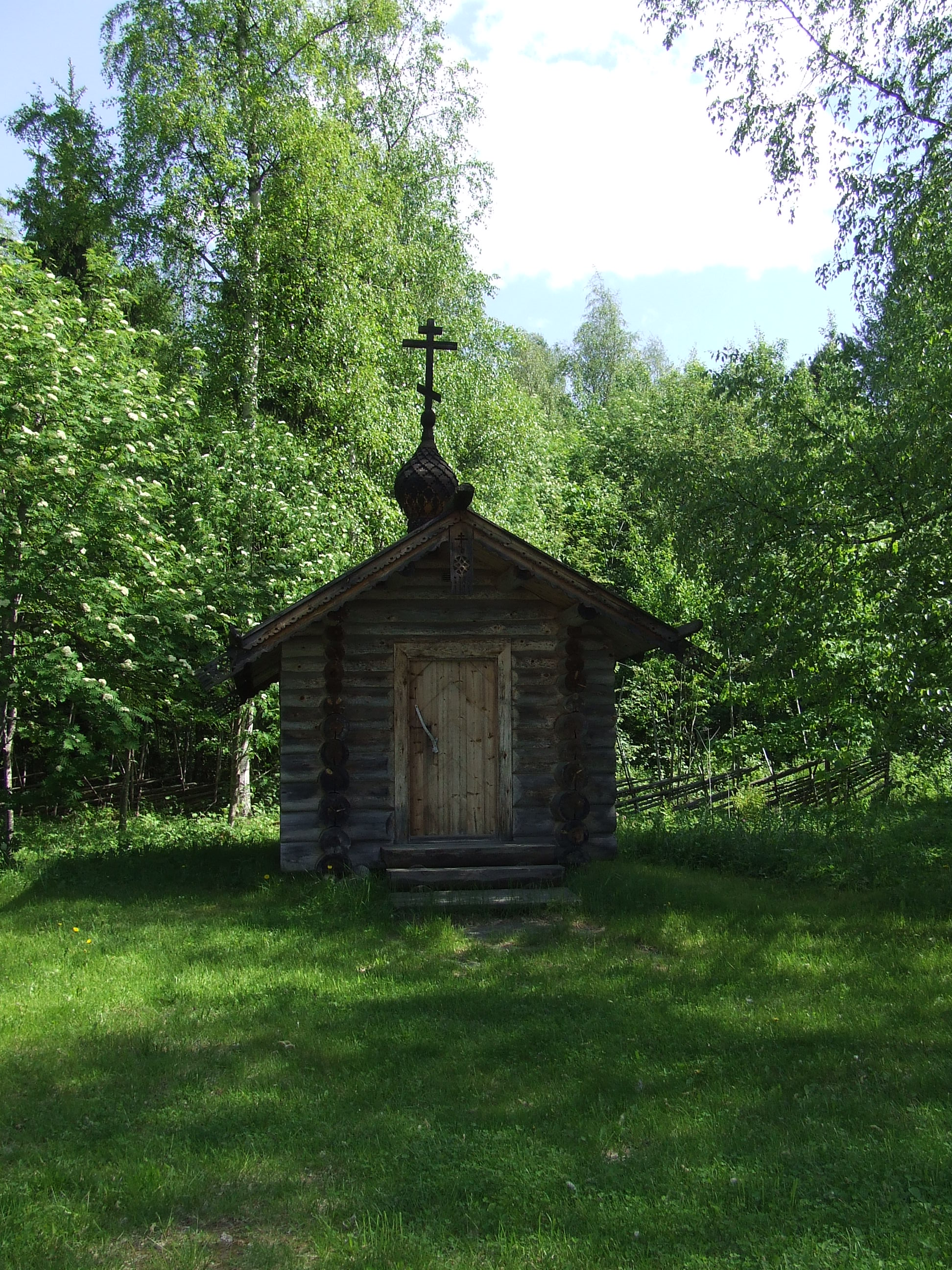 Herman Alaskalaisen tsasouna Joensuun Tuupovaaran Koveron kylässä.